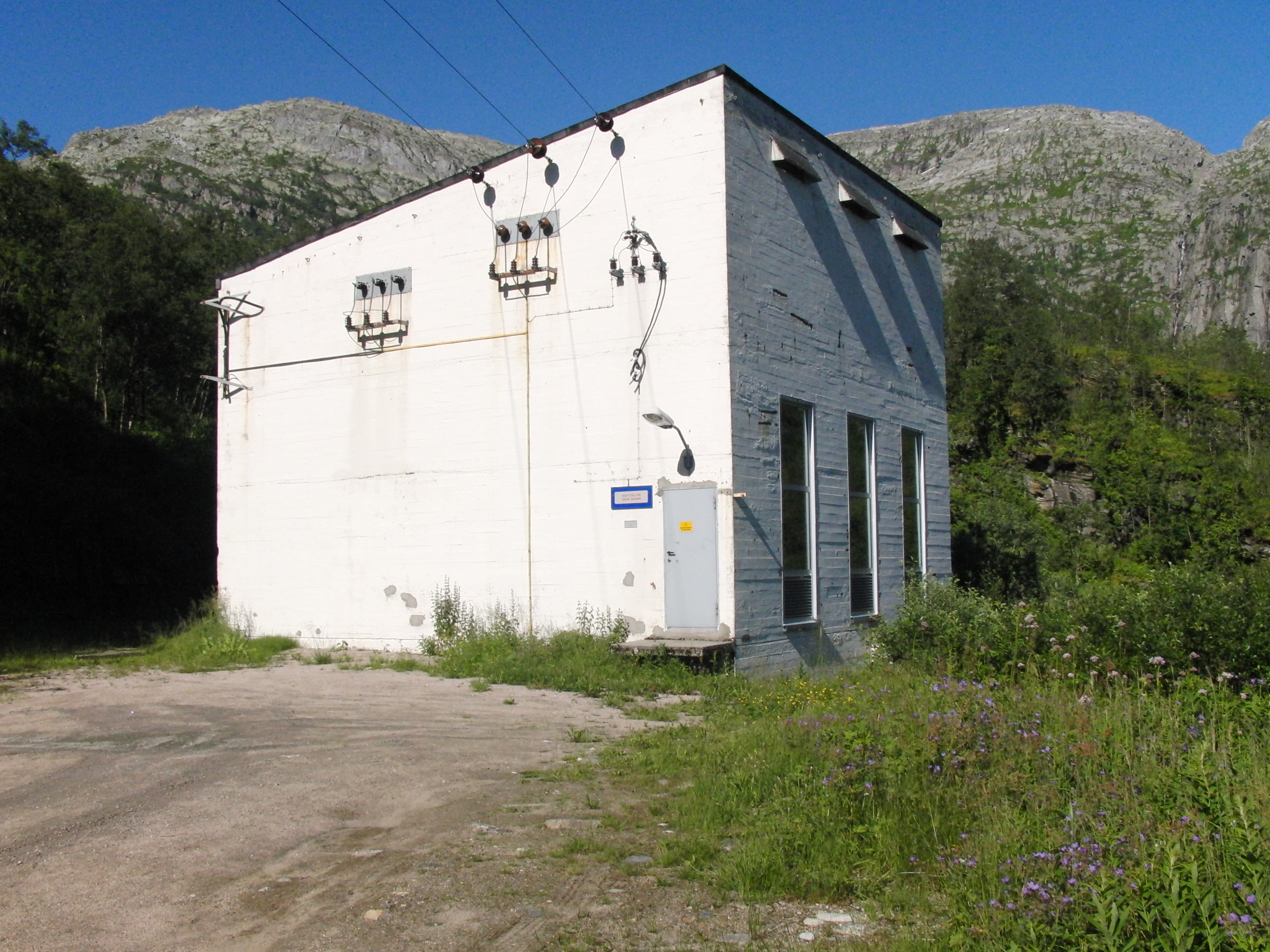 Neverdalsåga kraftverk